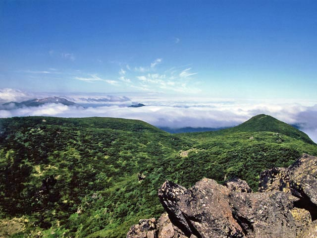 雄阿寒岳山頂より雌阿寒岳方面を望む・山頂はハイマツ帯。